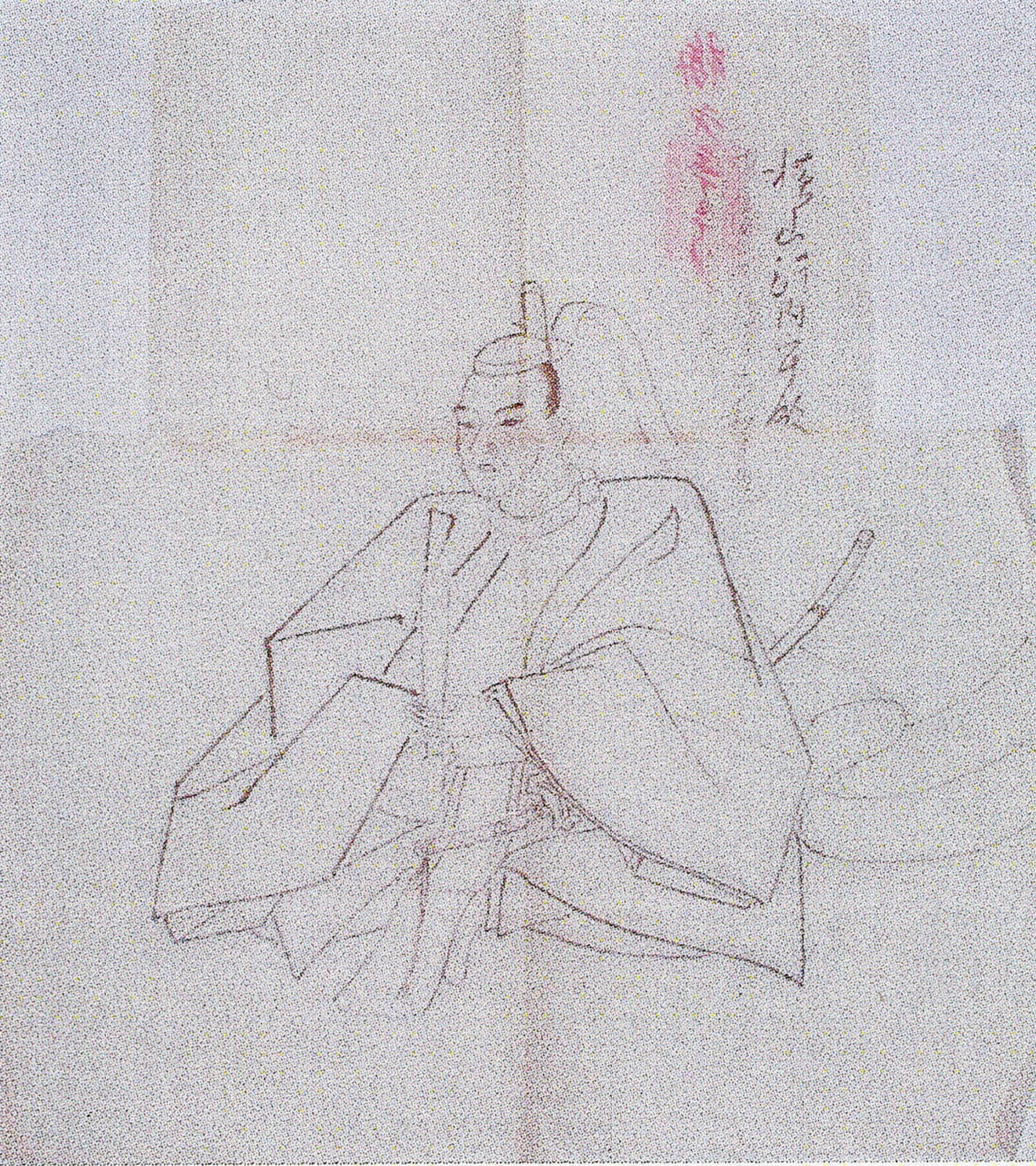 加賀八家横山氏7代当主・横山隆達の肖像画粉本。